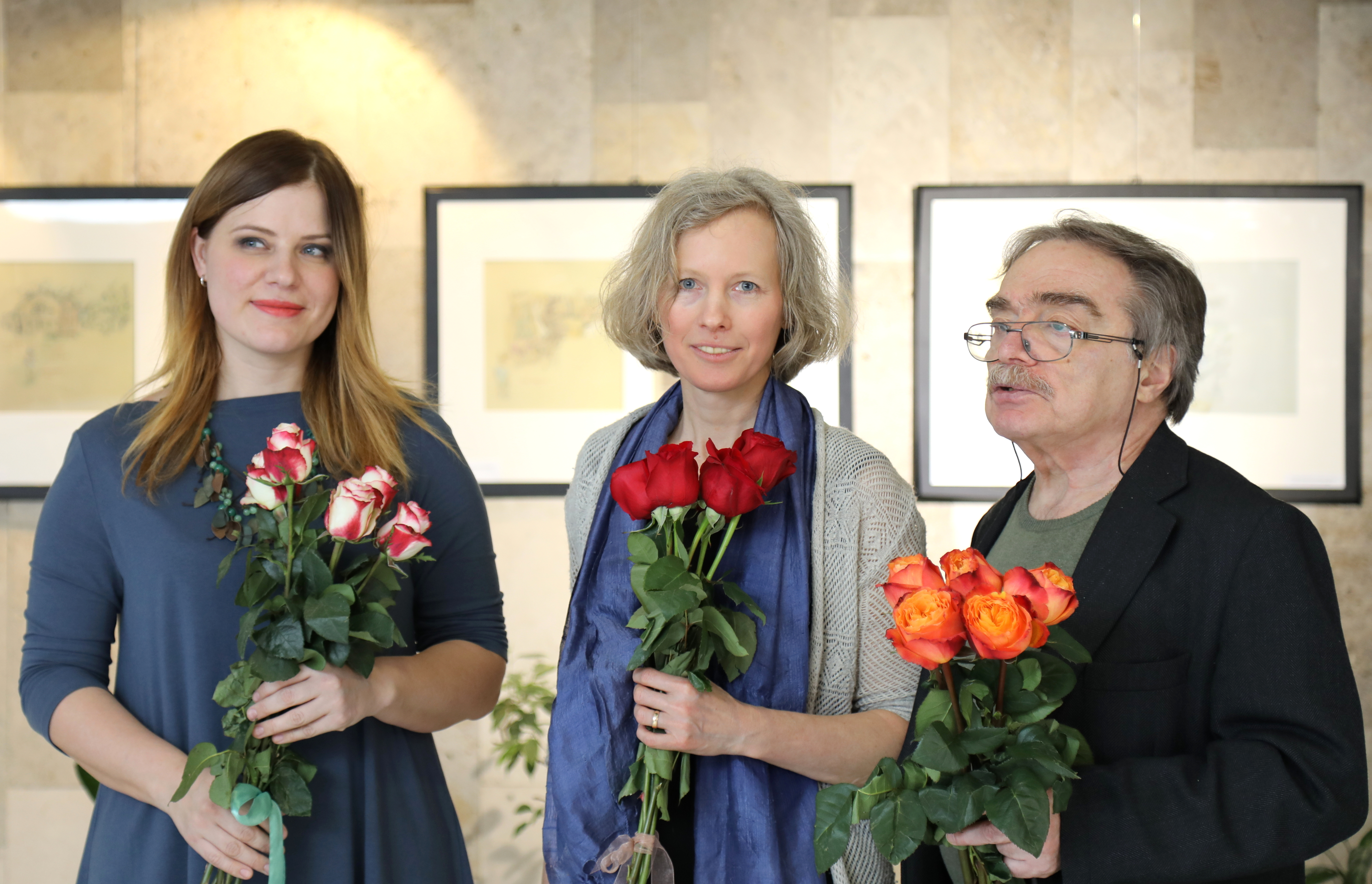 На презентации детской повести Александра Адабашьяна и Анны Чернаковой «Хрустальный ключ, или Жили-были мы», а также открытие выставки иллюстраций Александра Адабашьяна в Российской государственной детской библиотеке. Слева направо: Анастасия Образцова- художник по костюмам, Анна Чернакова, Александр Адабашьян.